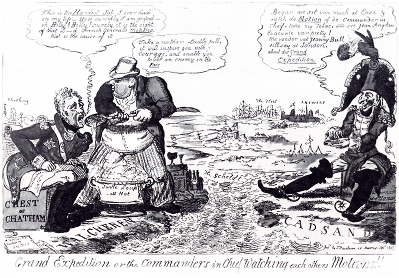 George Cruikshank: Grand Expedition or the Commanders in Chief Watching each outhers Motions!!, September 1809 Die Zeichnung bezieht sich auf die Niederlage der Engländer gegen die von den Franzosen verteidigte Insel Walcheren im Jahr 1809. Getrennt von der Schelde sitzen sich der englische Befehlshaber, der Herzog von Chatham und der französische Befehlshaber, General Bernadotte gegenüber. Chatham läßt sich von Sir William Curtis mit Schildkrötensuppe trösten. Der Franzose nimmt Schnupftabak und fragt sich, was wohl John Bull in London über dieses "große Unternehmen" zu sagen habe. Cruikshank zeichnete dieses Blatt bereits als Siebzehnjähriger. Originalgröße: 280 x 450 mm